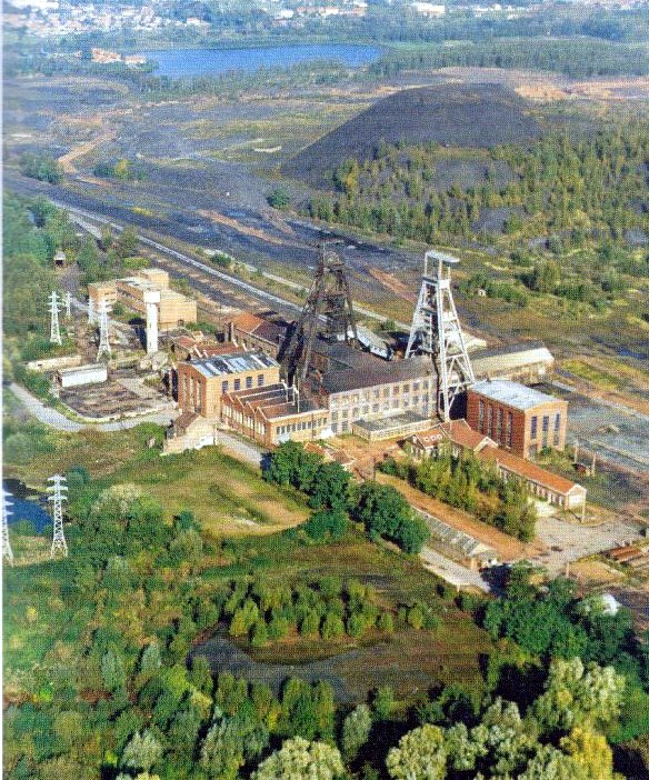 La fosse Ledoux de la Compagnie des mines d'Anzin était un charbonnage constitué de deux puits situé à Condé-sur-l'Escaut, Nord, Nord-Pas-de-Calais, France.